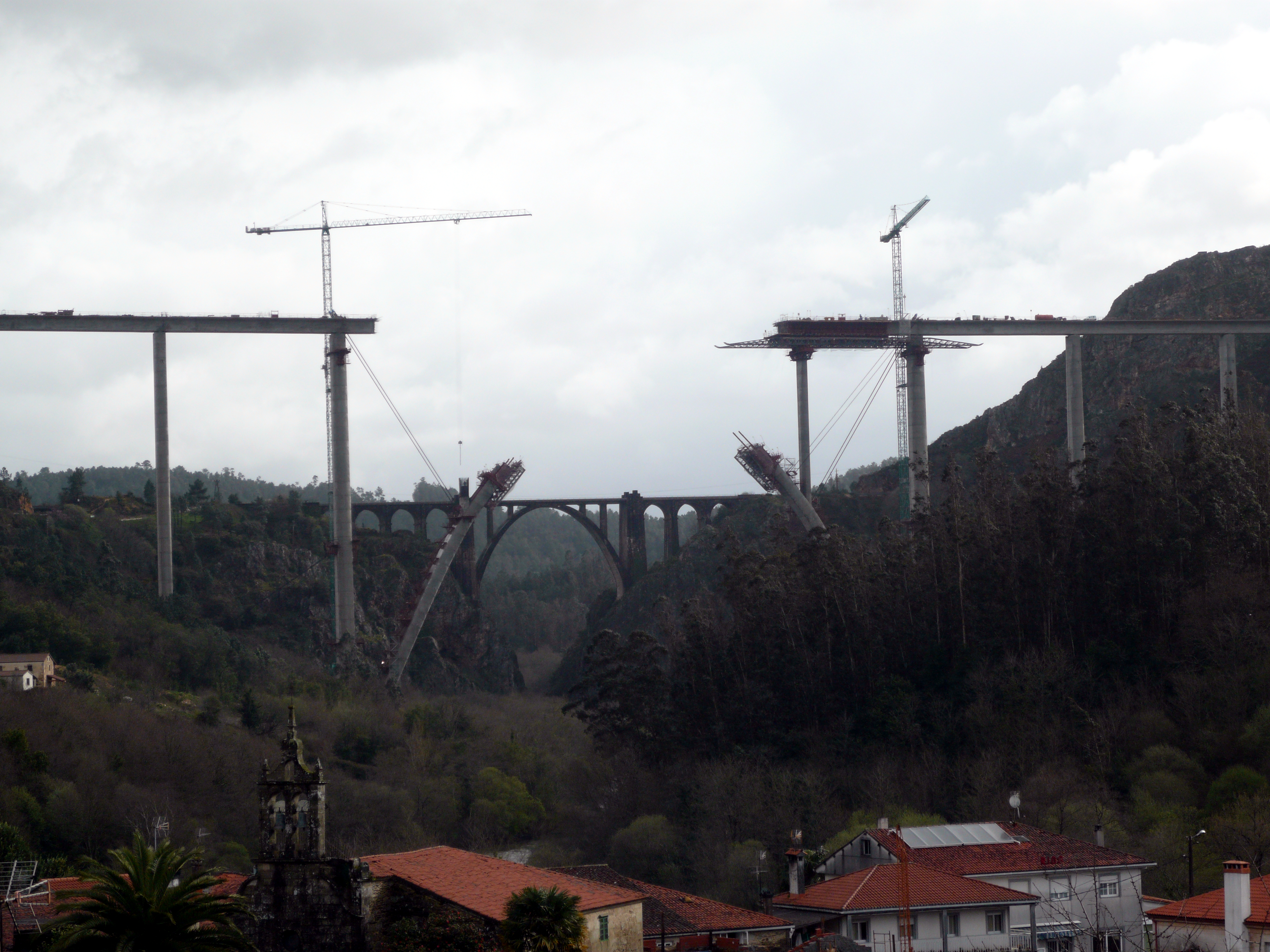 El viaducto del río Ulla, dentro del corredor de Alta Velocidad Norte-Noroeste, en el eje Ourense-Santiago, tiene una longitud de 630 m. Se apoya en el terreno sobre 9 pilas (con una altura máxima de 116.9 m), y sobre cinco pilastras que descansan sobre un arco de 168 m de luz que salva el río Ulla. El arco tiene una flecha de 104.39 m entre clave y arranques. El arco se construye con dos carros de avance en voladizo, uno para cada semiarco. Los semiarcos se van atirantando provisionalmente al tablero a medida que se van ejecutando, por lo que una vez que se van levantando cada dos pilastras sobre el semiarco es necesario construir el vano correspondiente del tablero. El tablero se ejecuta por el sistema de cimbra autoportante. Una vez cerrado el arco y ejecutado el tramo superior del tablero, se retirará el sistema de atirantado.